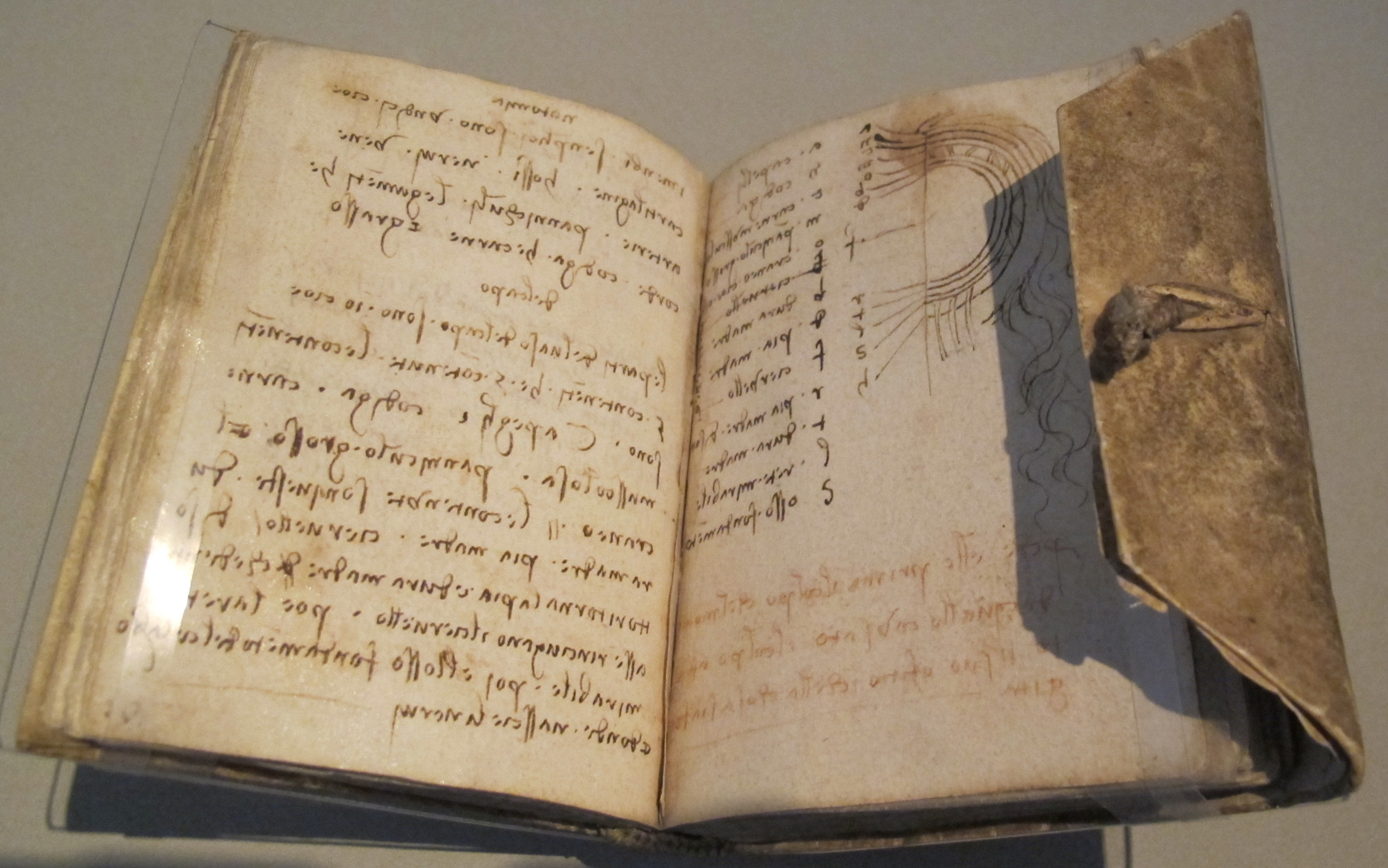 Leonardo da vinci, taccuino forster III, 1490 ca.